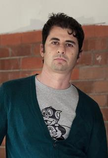 Giuseppe Catozzella fotografato da Alessandro Ummarino®